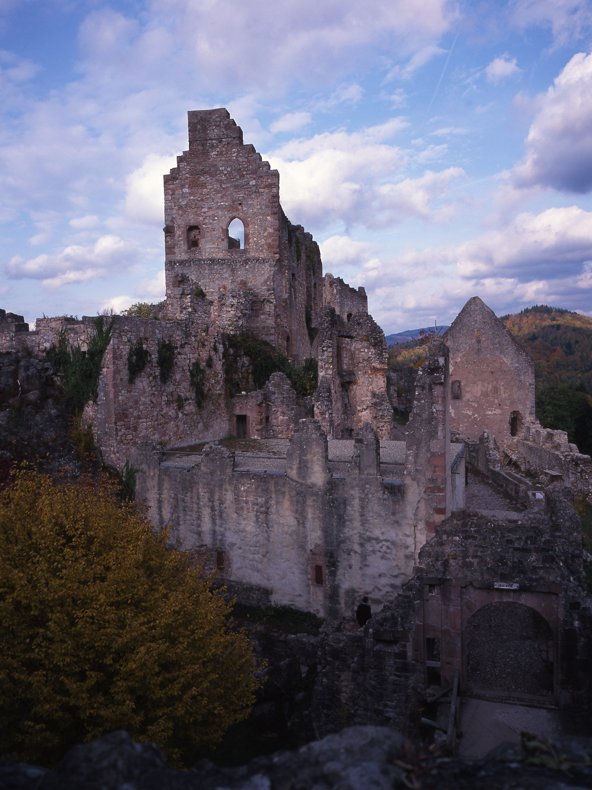 Deutschland, Baden-Württemberg, Emmendingen, Hochburg